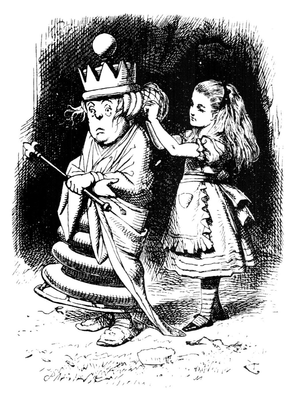 гравюра Джона Тенниела